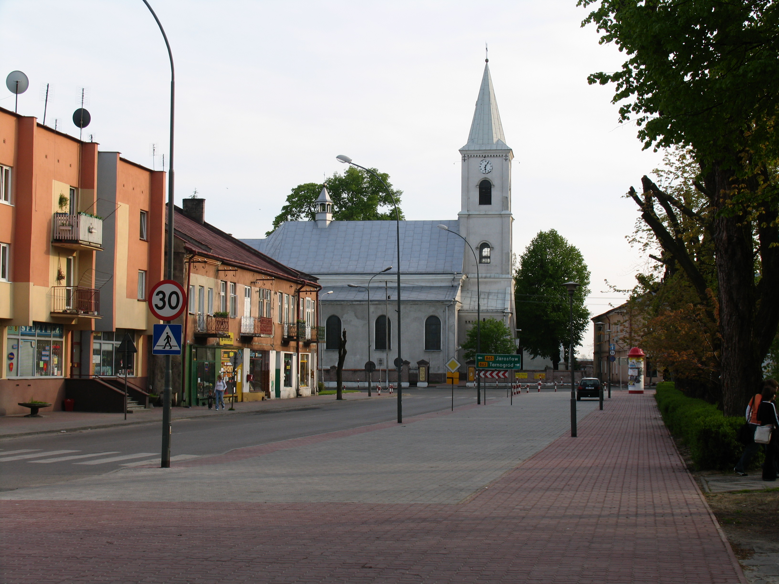 Kościół pw. św. Wojciecha w Cieszanowie